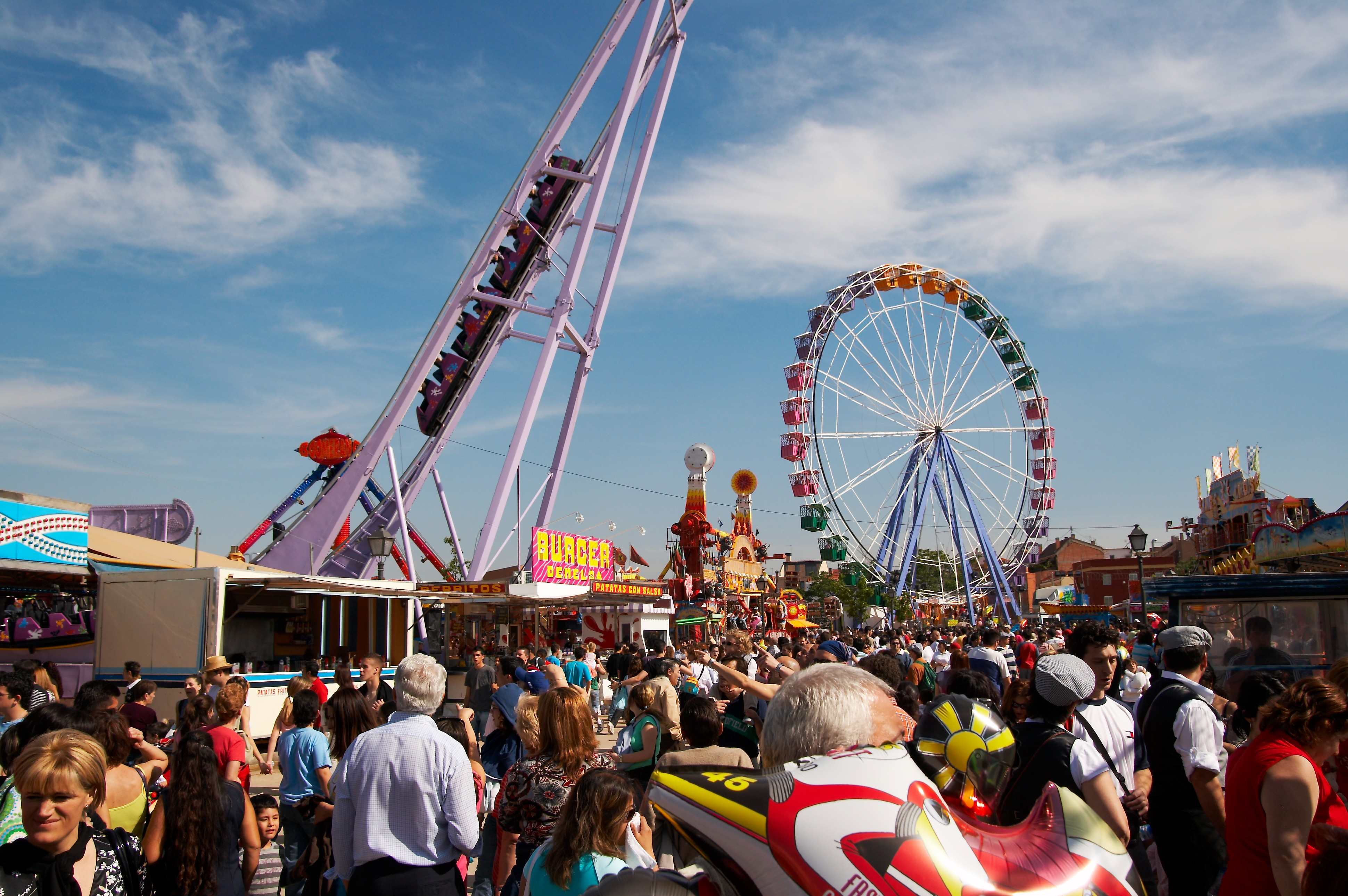 Parque de atracciones. Fiestas de San Isidro 2007, Madrid, España.